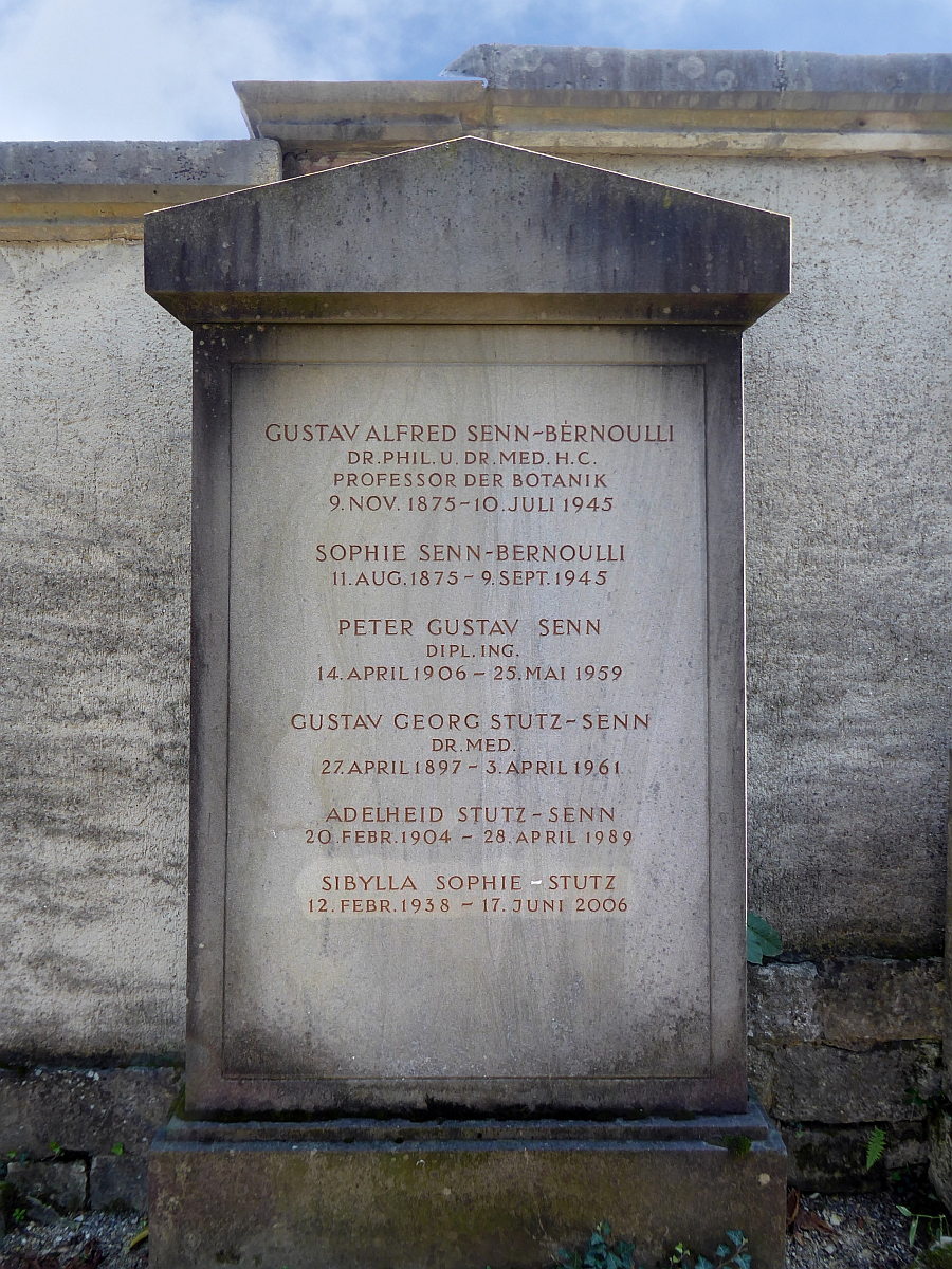 Gustav Georg Stutz-Senn (1897–1961) Arzt, Psychiater, Chefarzt der Psychiatrischen Klinik Hasenbühl Liestal, Grab auf dem Friedhof Wolfgottesacker, Basel